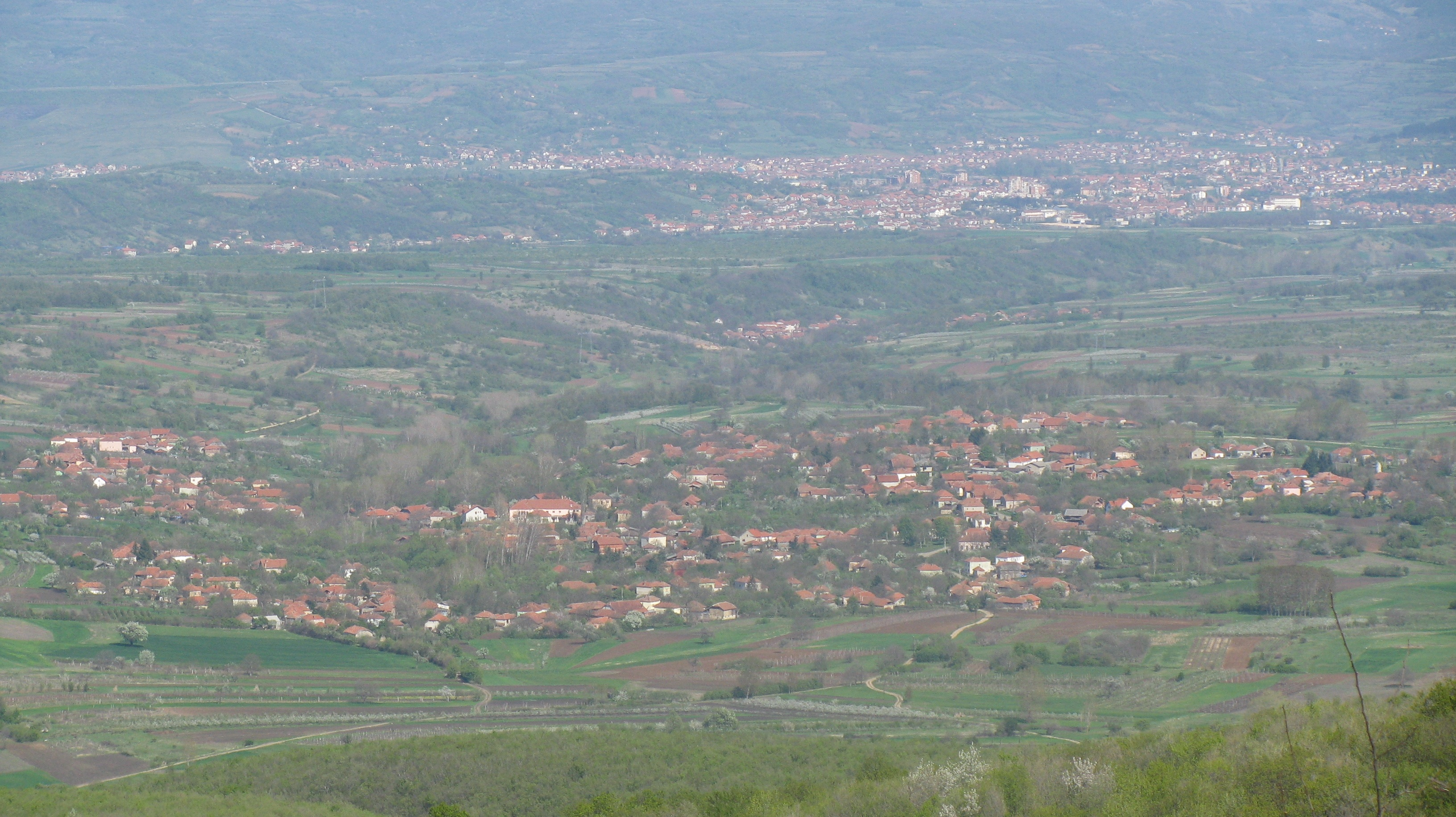 Pogled na selo Vasilj sa planine Vrlejice u pozadini se vidi i grad Knjaževac